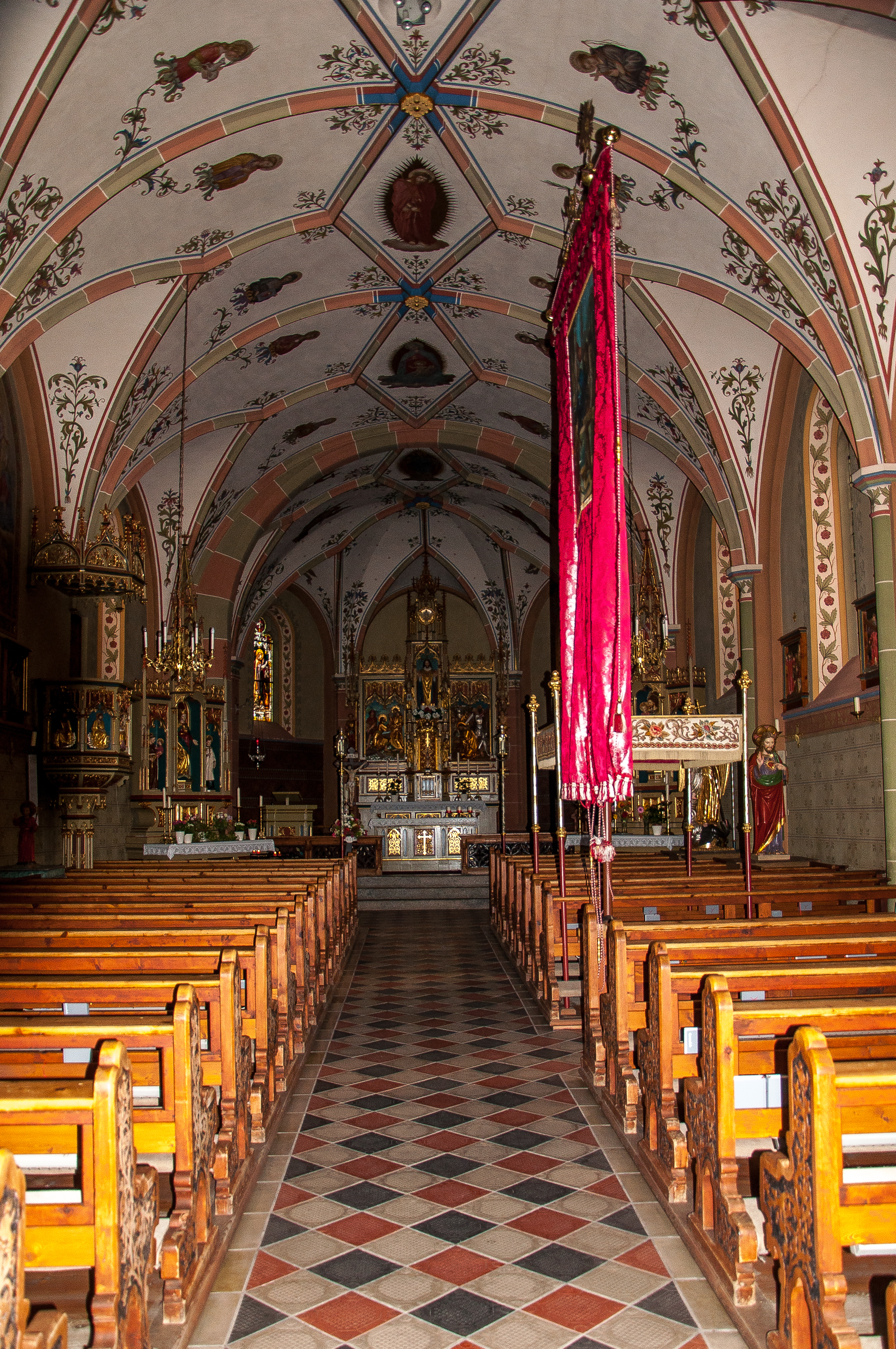 Kath. Pfarrkirche hl. Jakobus d. Ä. und Kriegerdenkmal